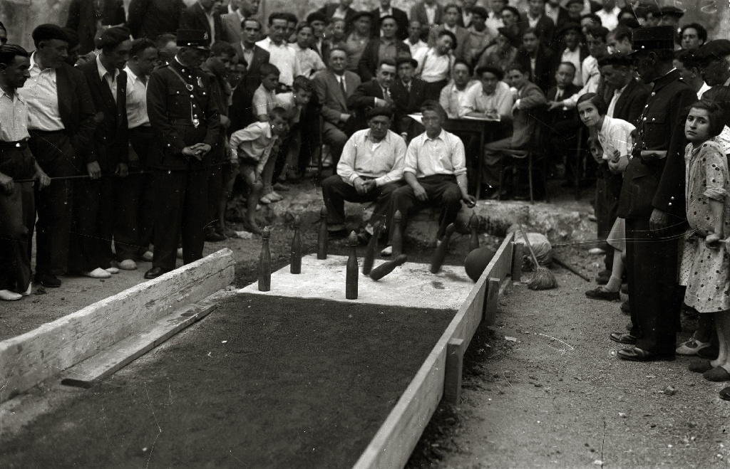 Bola jokoan Donostiako Trinitate plazan, eskuzulo aldaeran jokatzen